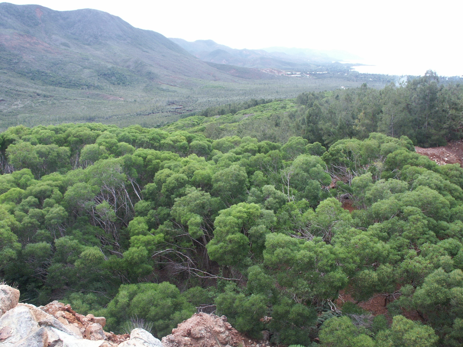 Mine de Rouvray, Commune du Montdore, Nouvelle-Calédonie, réhabilitée douze plus tôt avec principalement du faux gaïac et du bois de fer.